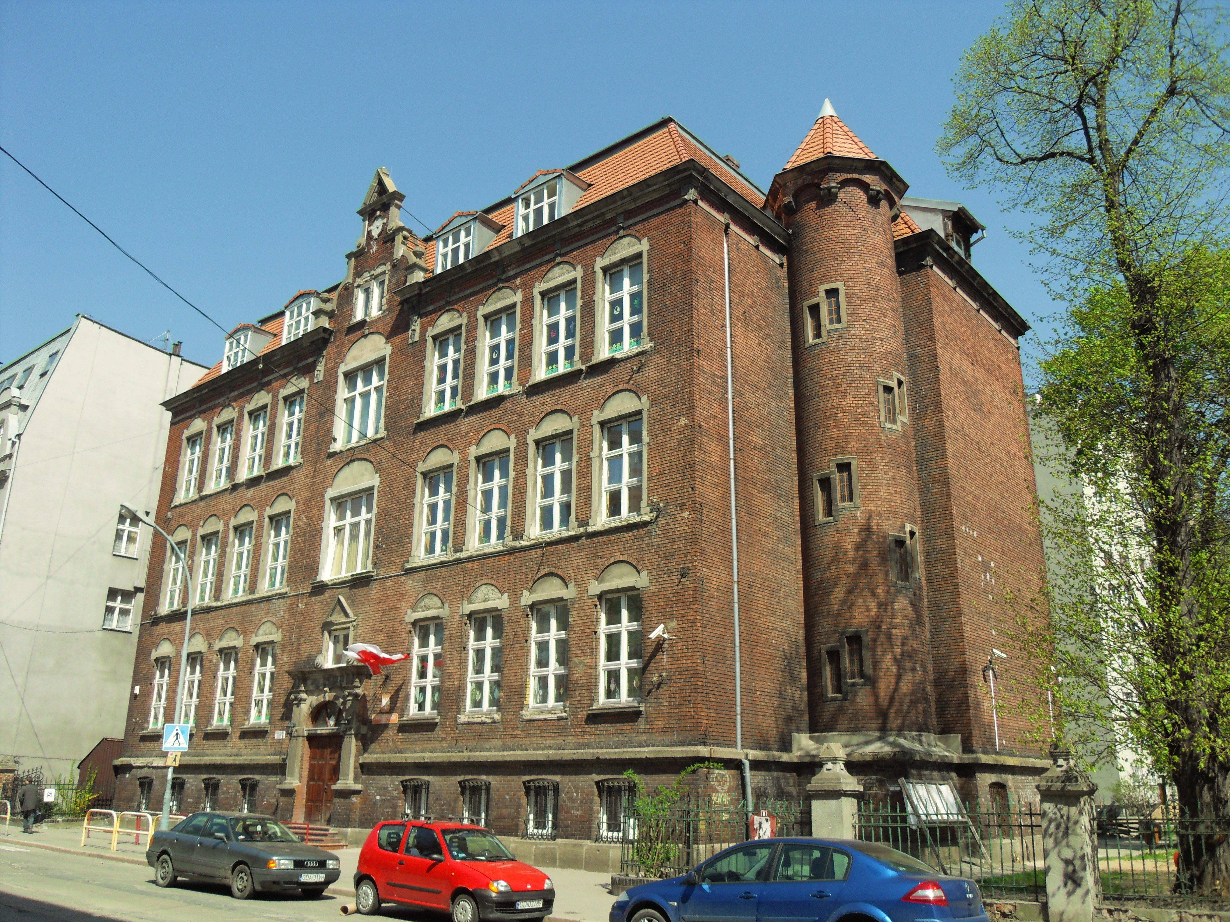 Gdańsk Długie Ogrody. Szkoła podstawowa nr 4, ul. Łąkowa 61.